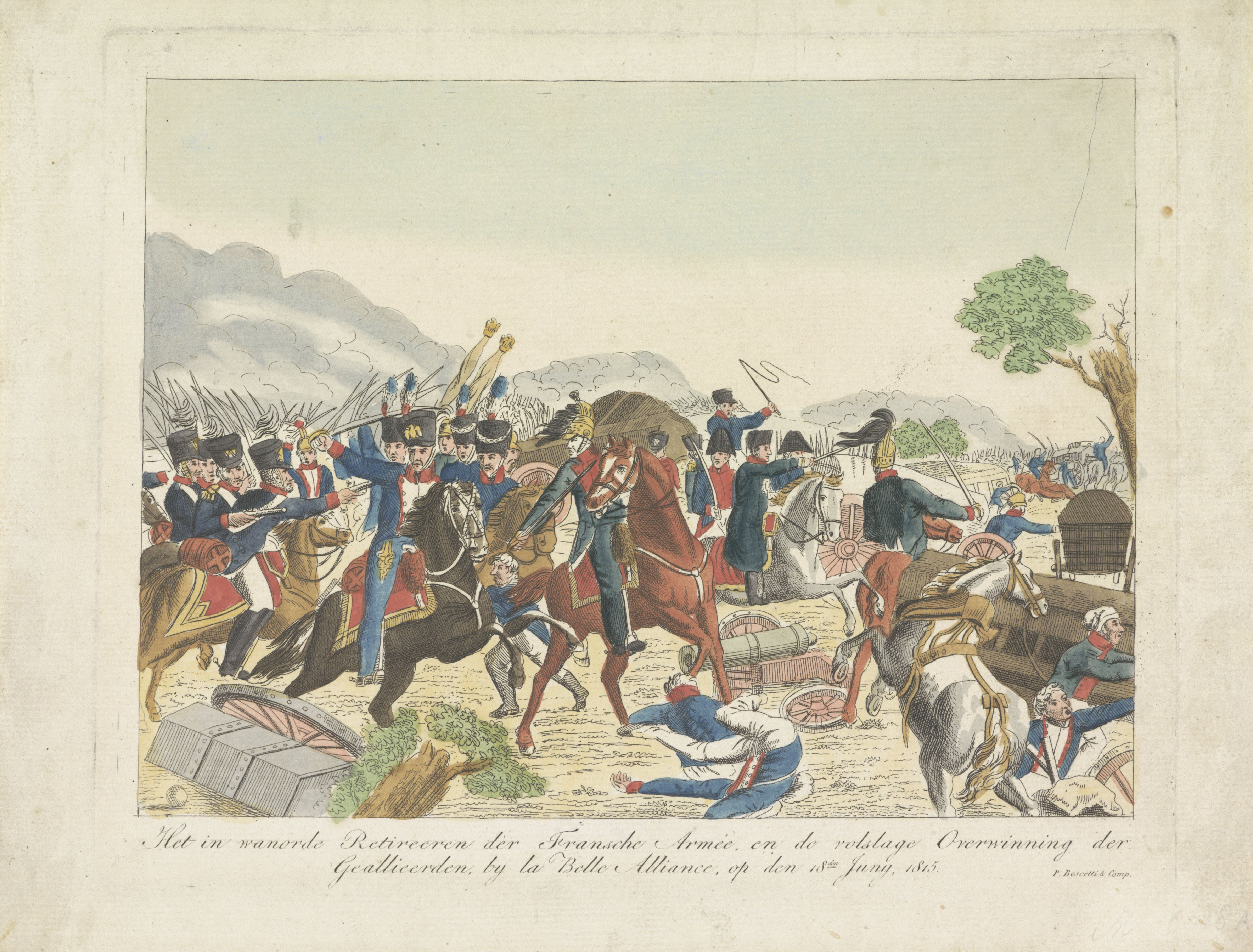 IdentificatieTitel(s): Aftocht van het Frans leger, 1815Het in wanorde Retireeren der Fransche Armée, en de volslage Overwinning der Geallieerden, bij la Belle Alliance, op den 18den Junij, 1815 (titel op object)Objecttype: prent Objectnummer: RP-P-1898-A-19813Catalogusreferentie: FMH 6028-AOpschriften / Merken: verzamelaarsmerk, verso, gestempeld: Lugt 2228Omschrijving: Het chaotische terugtrekken van het Franse leger na de overwinning van de Geallieerden in de Slag bij Waterloo op 18 juni 1815. Vooraan naar rechts vluchtend rijdt Napoleon met zijn adjudanten.VervaardigingVervaardiger: prentmaker: anoniemuitgever: P. Boscetti et Comp. (vermeld op object)Plaats vervaardiging: NederlandDatering: 1815Fysieke kenmerken: ets, met de hand gekleurdMateriaal: papier Techniek: etsen / met de hand kleurenAfmetingen: plaatrand: h 197 mm × b 242 mmOnderwerpWat: battle (+ land forces)putting the enemy to flightSlag bij WaterlooWanneer: 1815-06-18 - 1815-06-18Waar: WaterlooWie: Napoleon I BonaparteVerwerving en rechtenVerwerving: aankoop 1898Copyright: Publiek domein